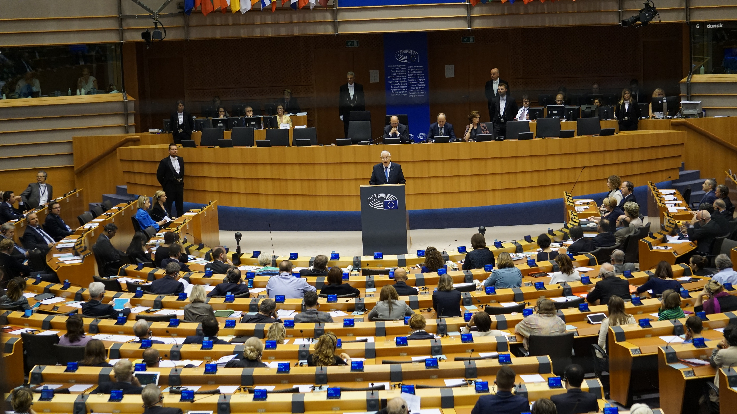 נשיא מדינת ישראל ראובן ריבלין נואם בפרלמנט של האיחוד האירופי